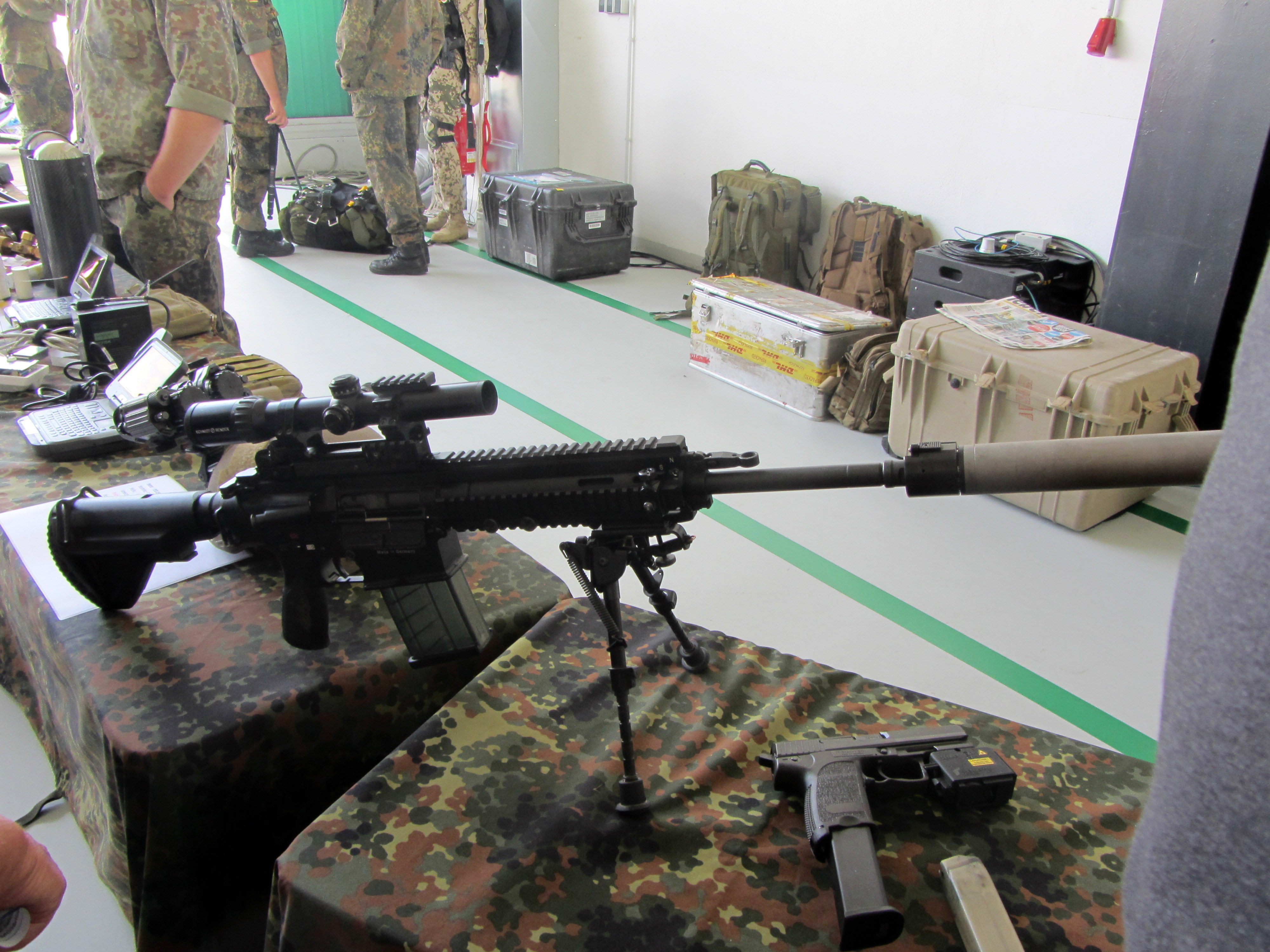 Tag der Bundeswehr 2015 (Militärflugplatz Laupheim)